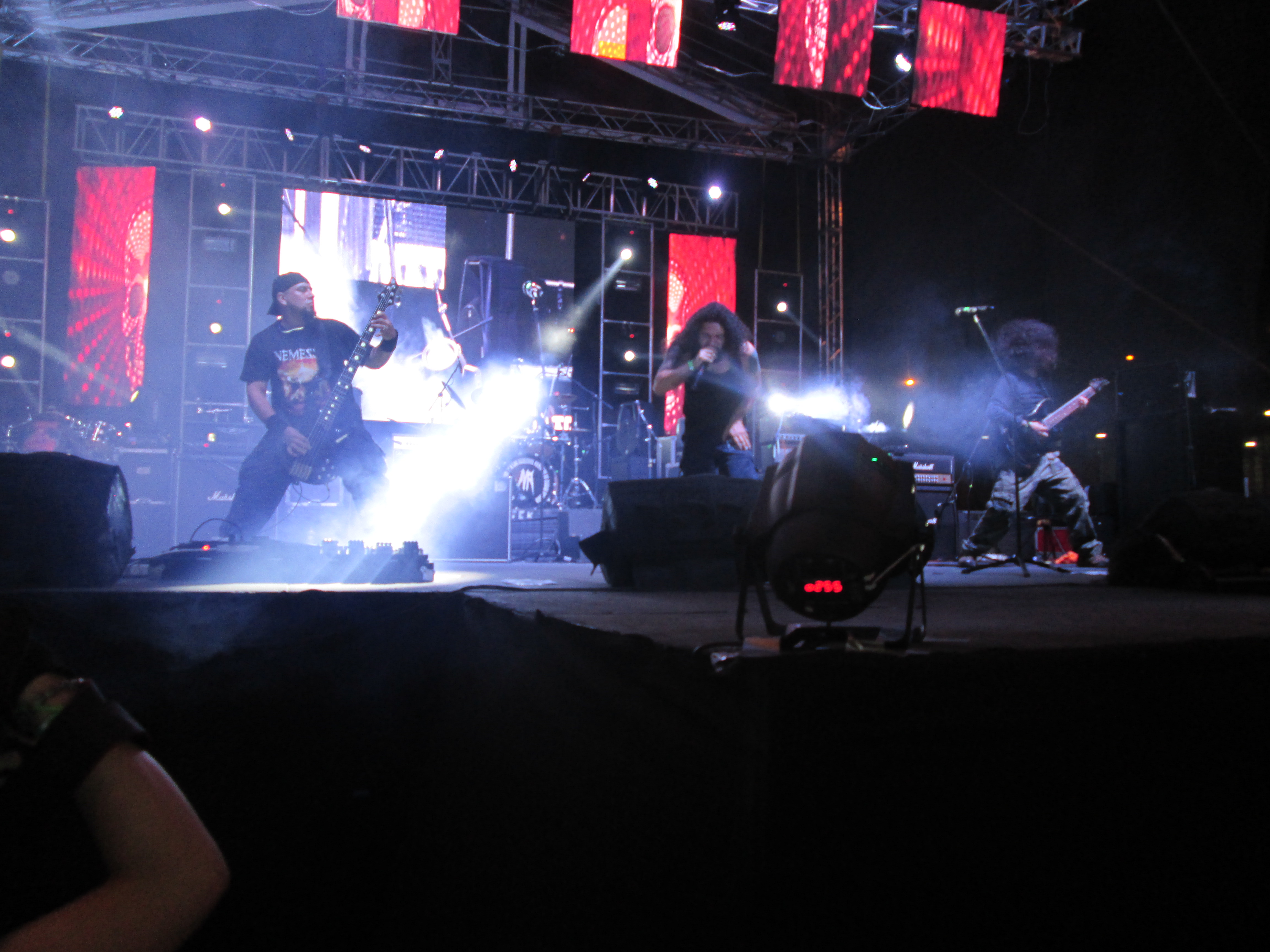 New Line Up